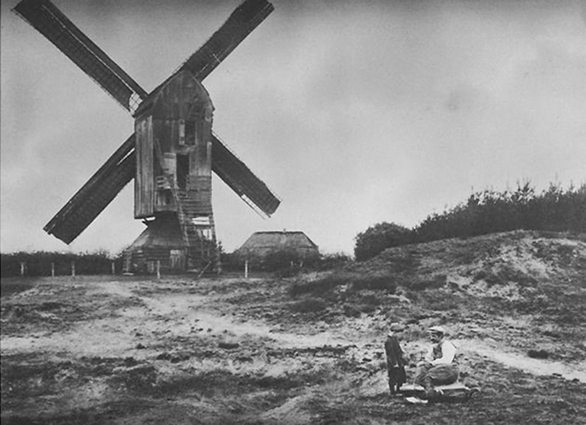 Doesburgermolen